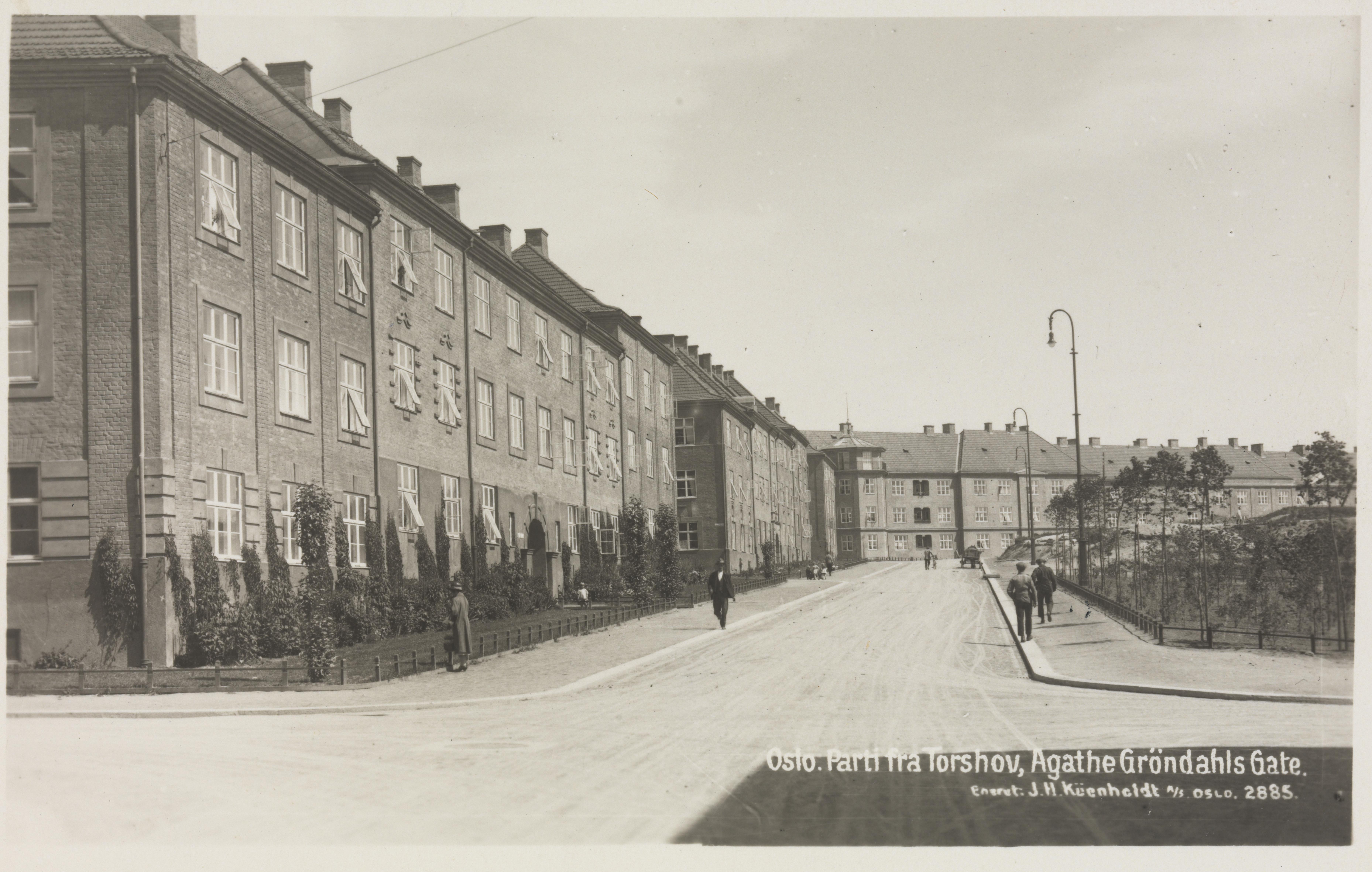 Bildet er hentet fra Nasjonalbibliotekets bildesamling